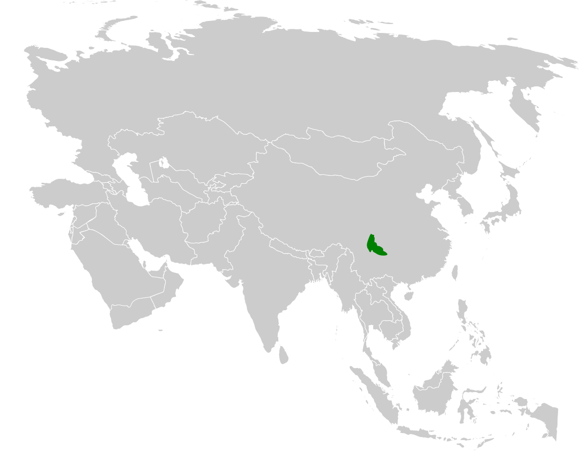 Sinosuthora zappeyi distribution map